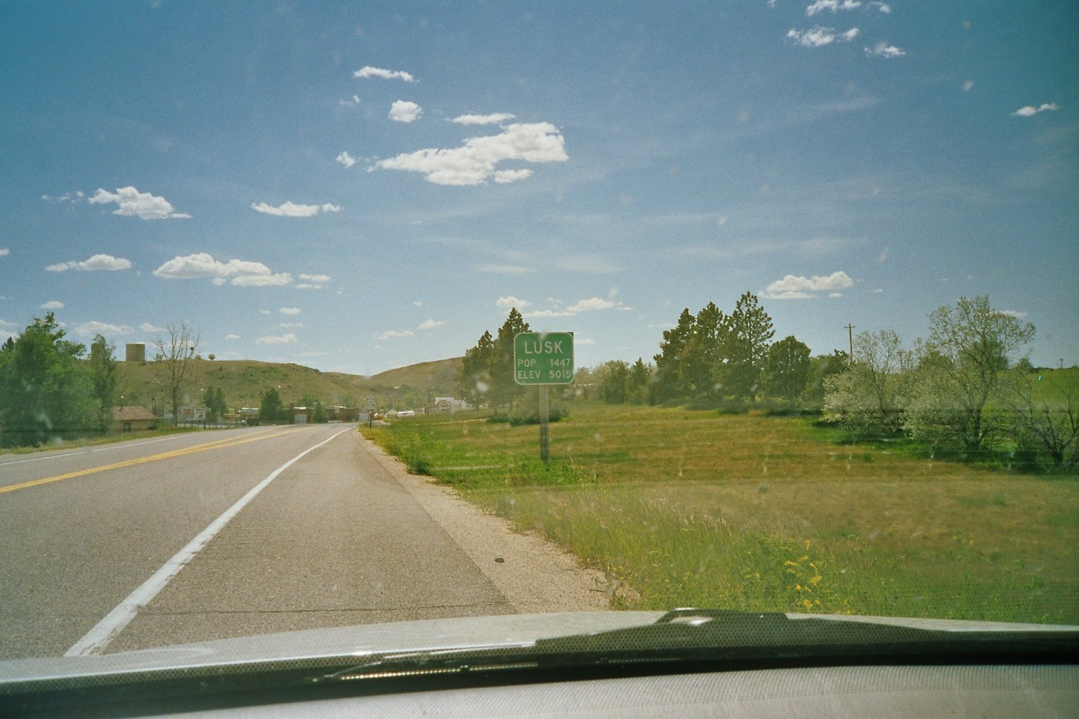 Lusk Niobrara County